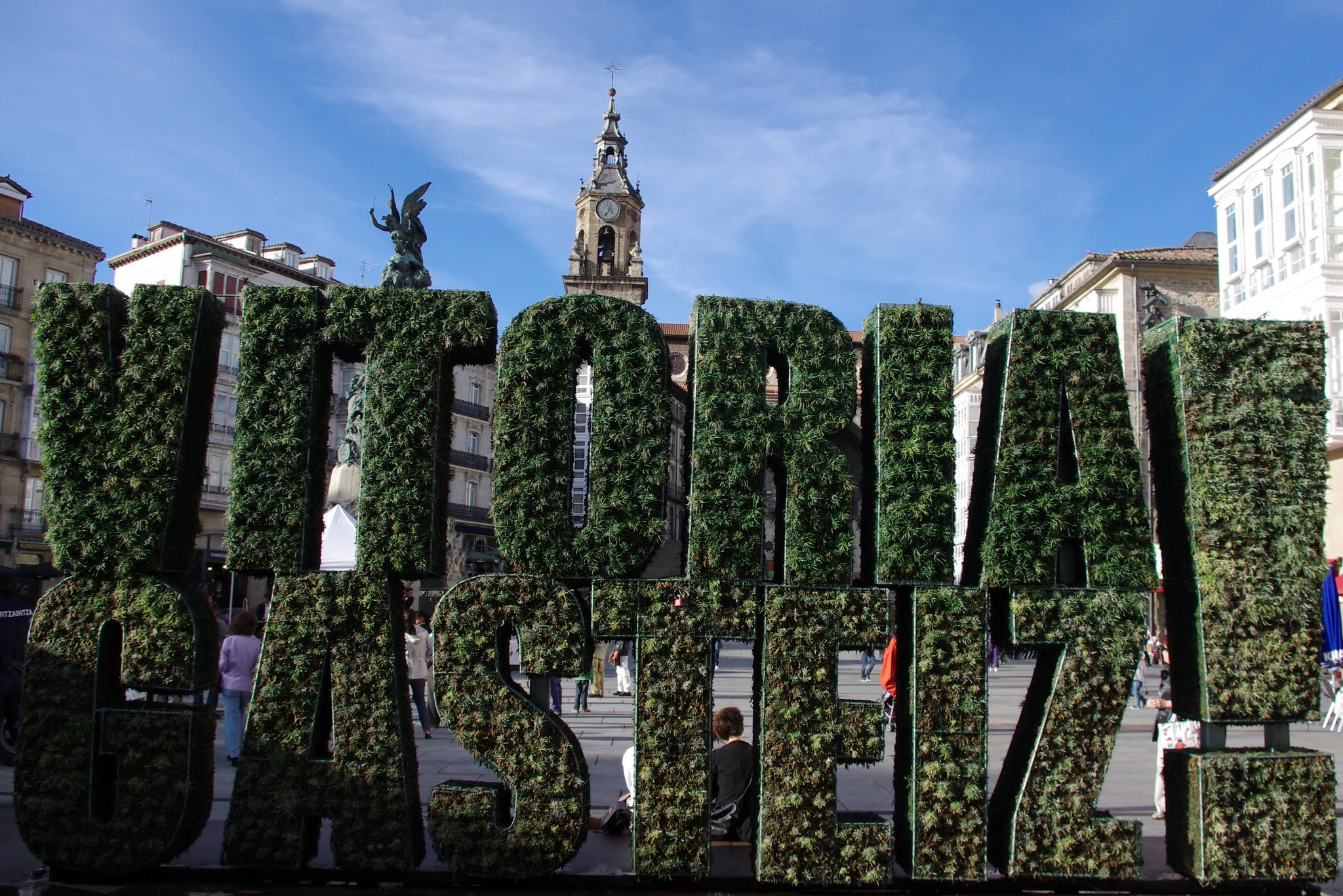 Green Vitoria